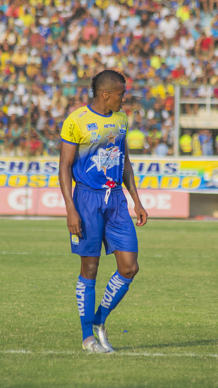 Marcos Cangá en Delfín Sporting Club 2015